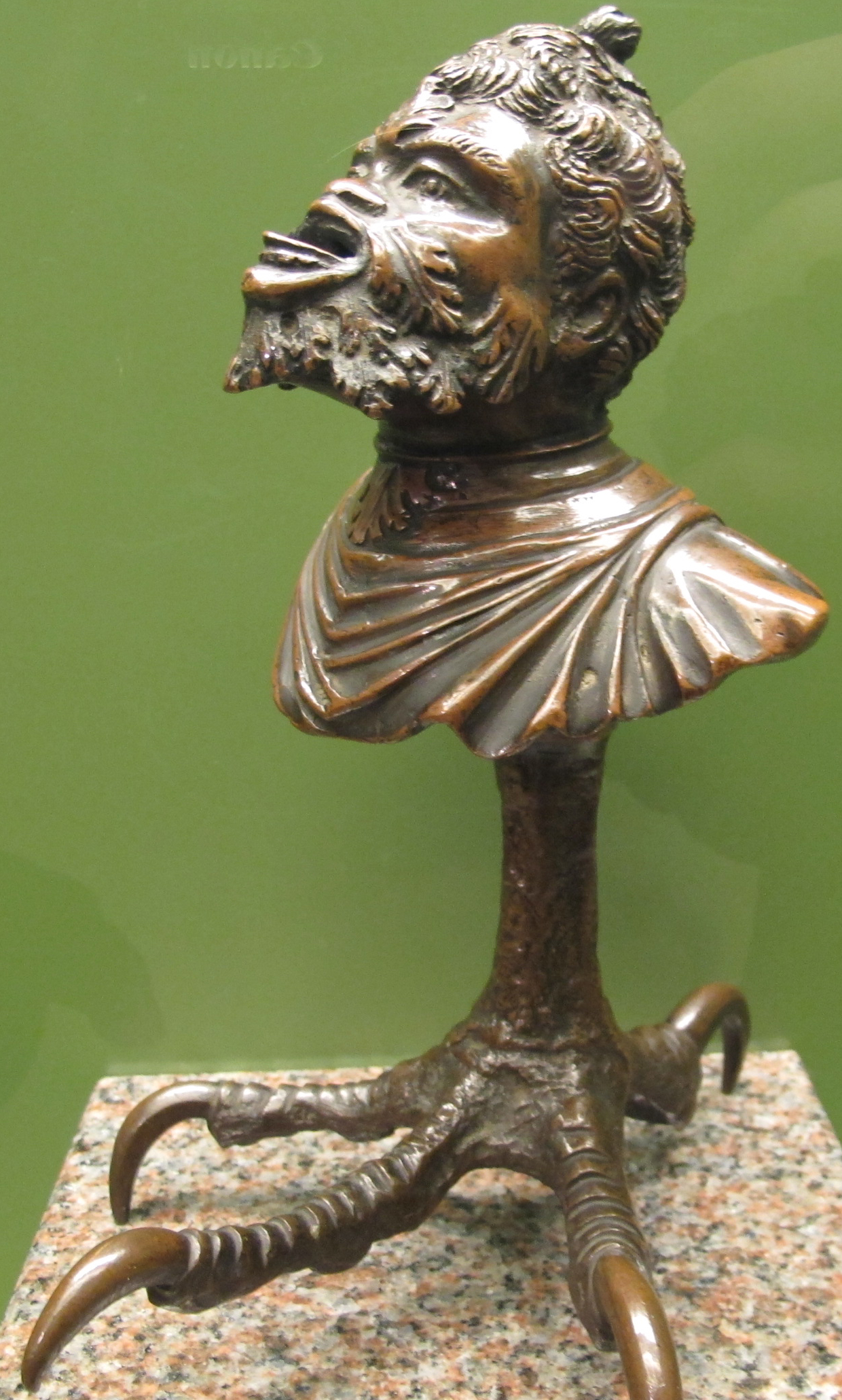 Severo calzetta da ravenna, lampada ad olio con piede rapace